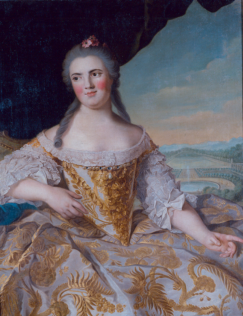 Ritratti: Luisa Elisabetta di Francia. Abbigliamento: abito in seta bianca ricamato in oro con trine e pizzi. Vedute: parco di Versailles: lago degli Svizzeri e Orangerie.